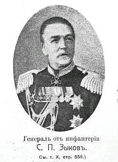 Это изображение было использовано для иллюстрирования статьи «Зыков, Сергей Павлович» опубликованной в десятом томе «Военной энциклопедии», который был издан книгоиздательским товариществом И. Д. Сытина в 1912—1913 гг. в столице Российской империи городе Санкт-Петербурге.